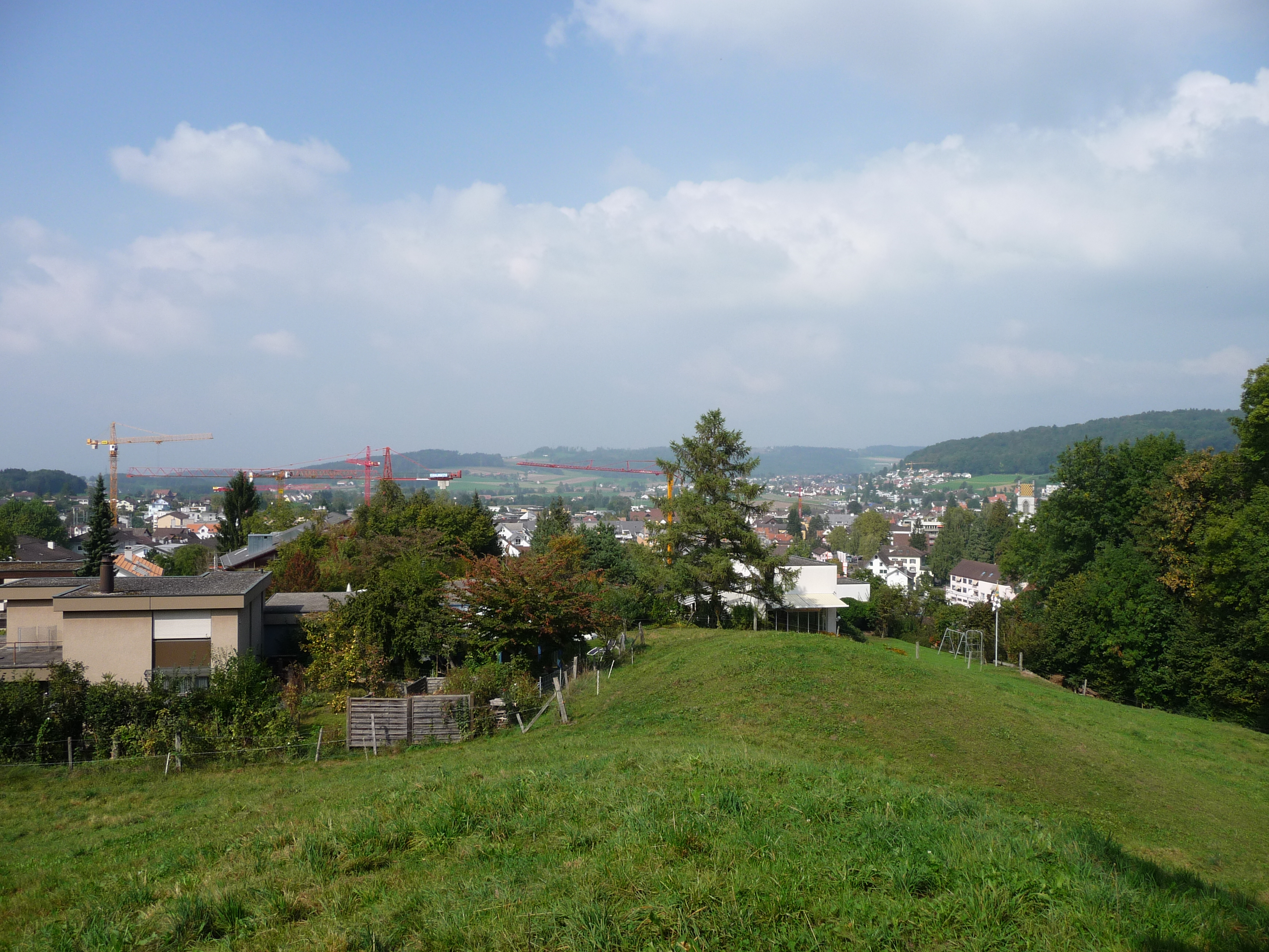 Affoltern am Albis.